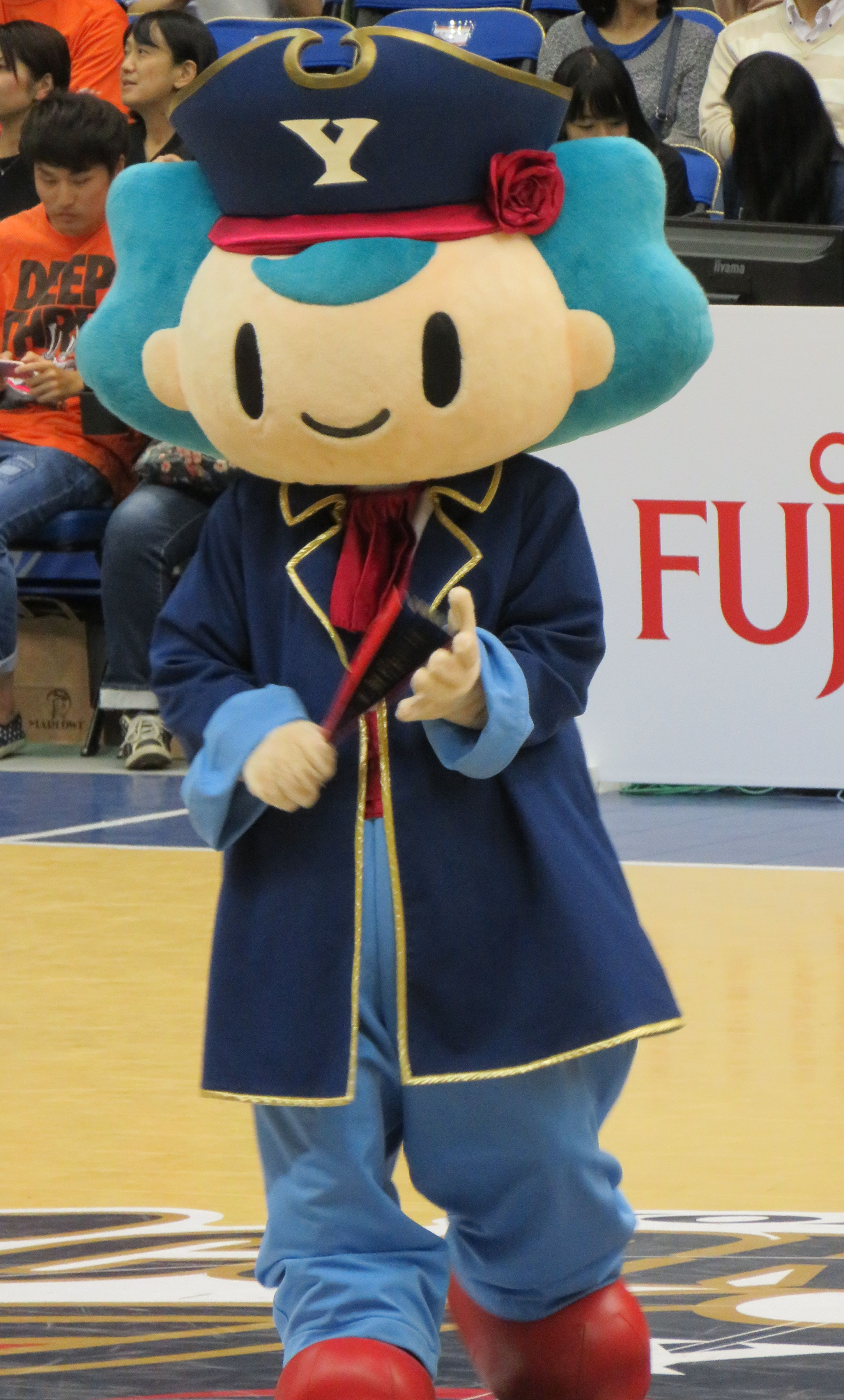 2018年10月24日 2018-19 B1 第4節 横浜-滋賀 横浜国際プール